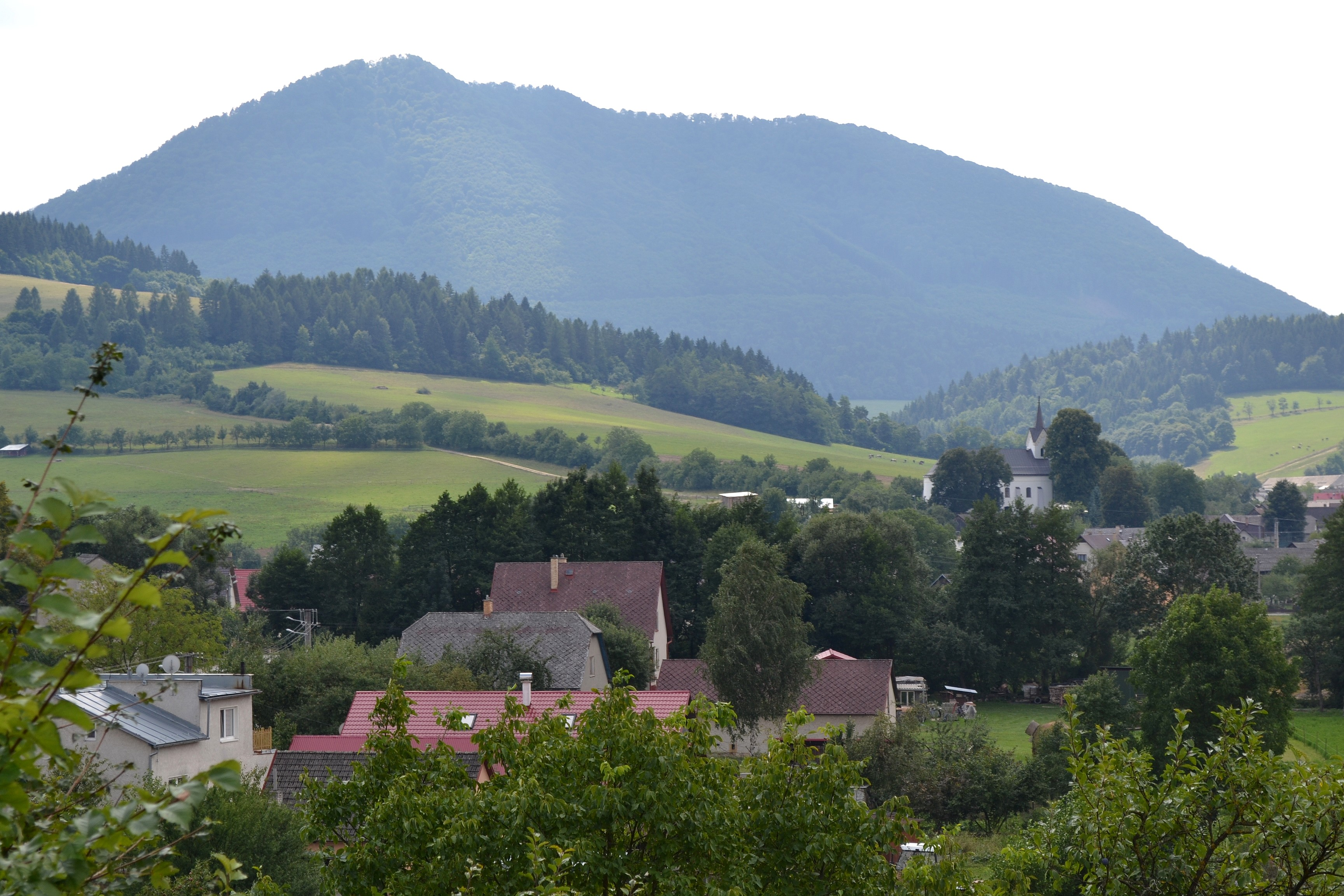 Slopná (okr. Považská Bystrica), pohľad na obec zo severu; v pozadí masív Ostrej Malenice (909 m n.m.)